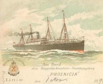 Der Dampfer Phoencia der Hapag 1898